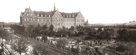 Historisches Dreigiebel-Haus des Alexianer St. Joseph-Krankenhaus Berlin-Weißensee